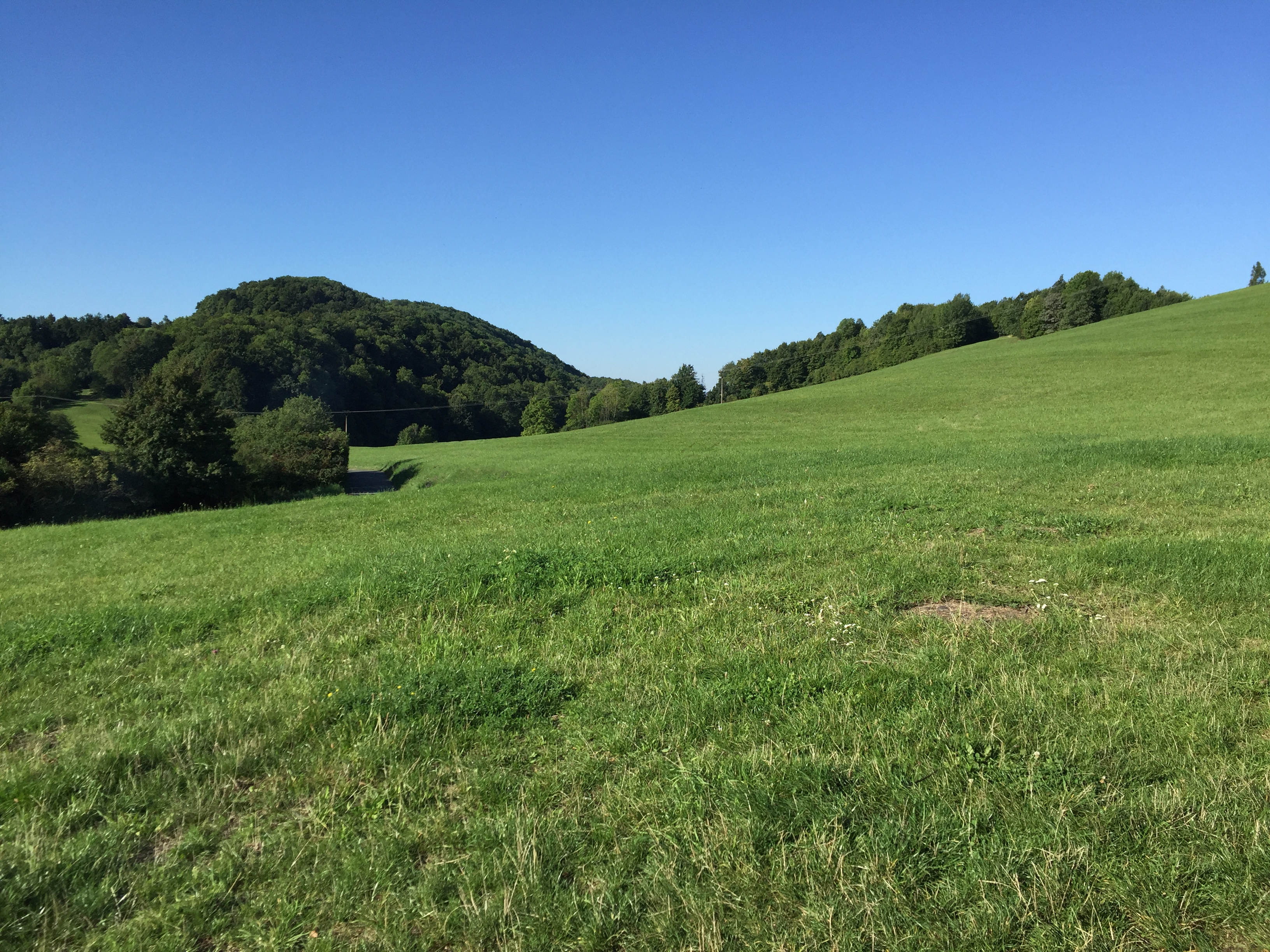 Požaha